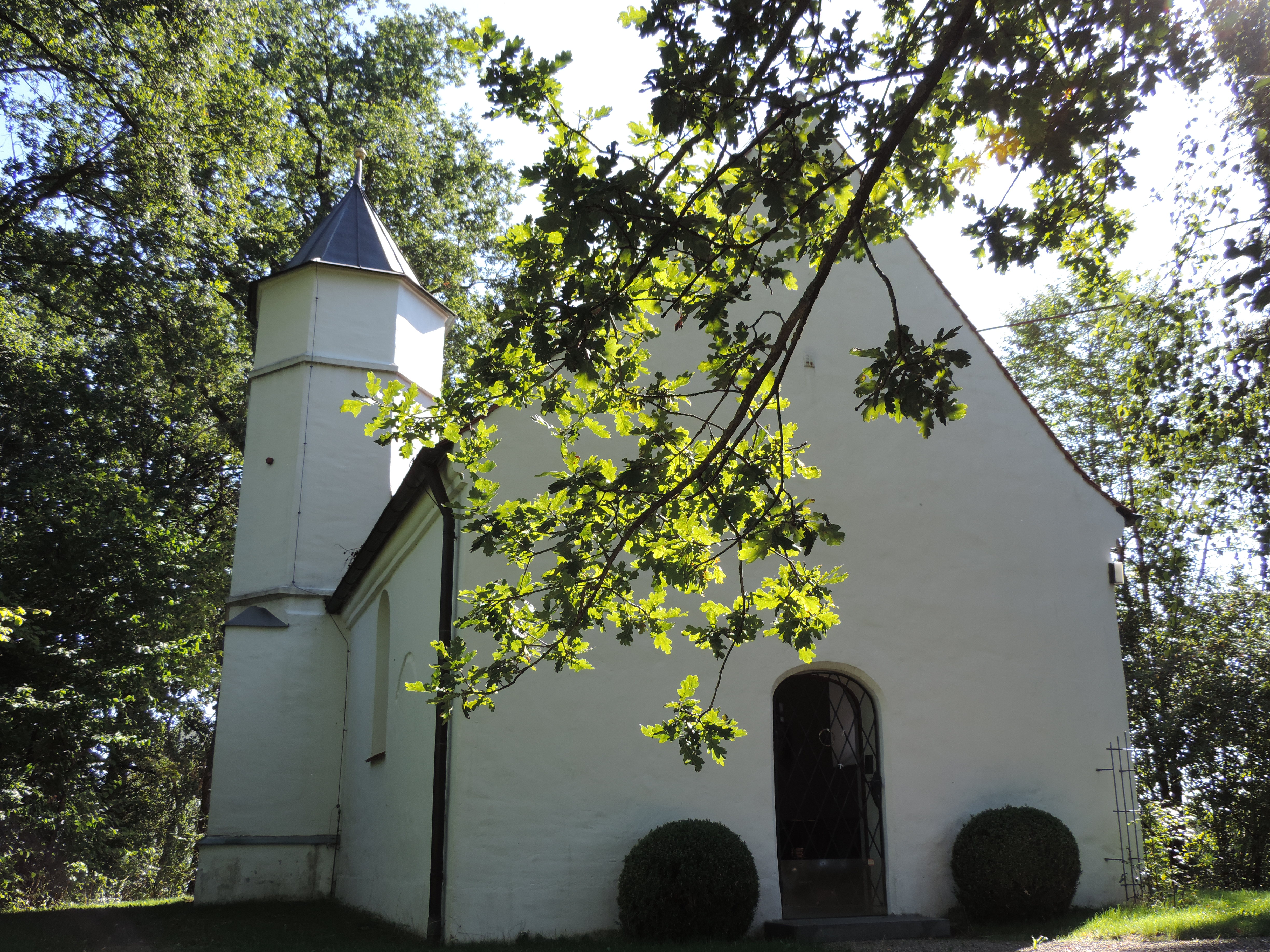 Westseite